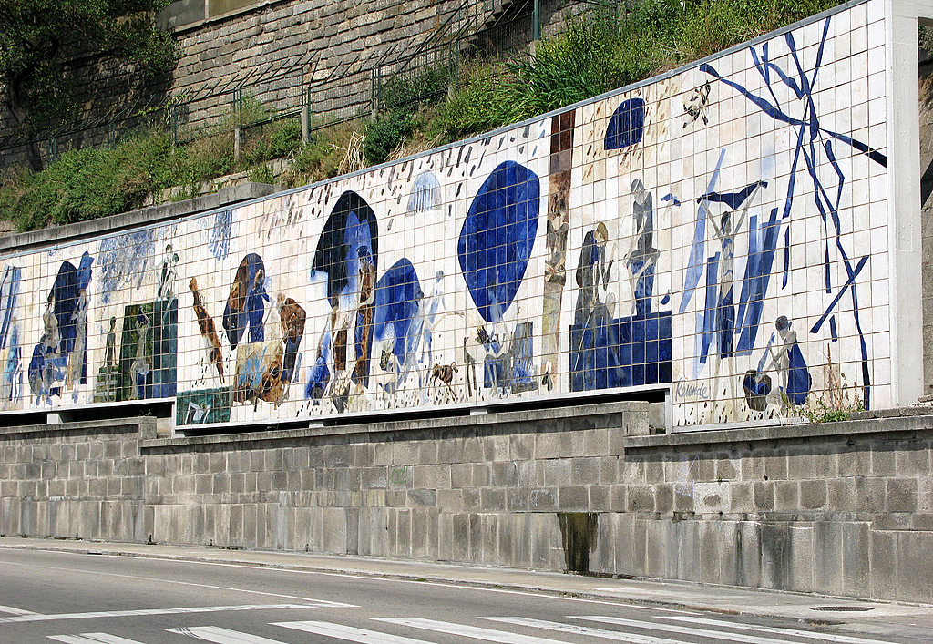 "Ribeira Negra" by Júlio Resende, in Porto, Portugal